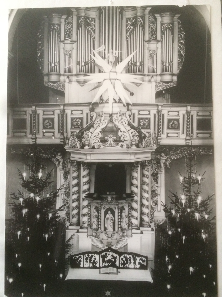 Altar, Kanzel und Ladegast Orgel, historischer Prospekt von Joh. Hen. Kleine 1764. Weihnachten ca. 1960, vor der Erneuerung durch Fa. Führer, welche den Prospekt nicht veränderte (Foto privat)